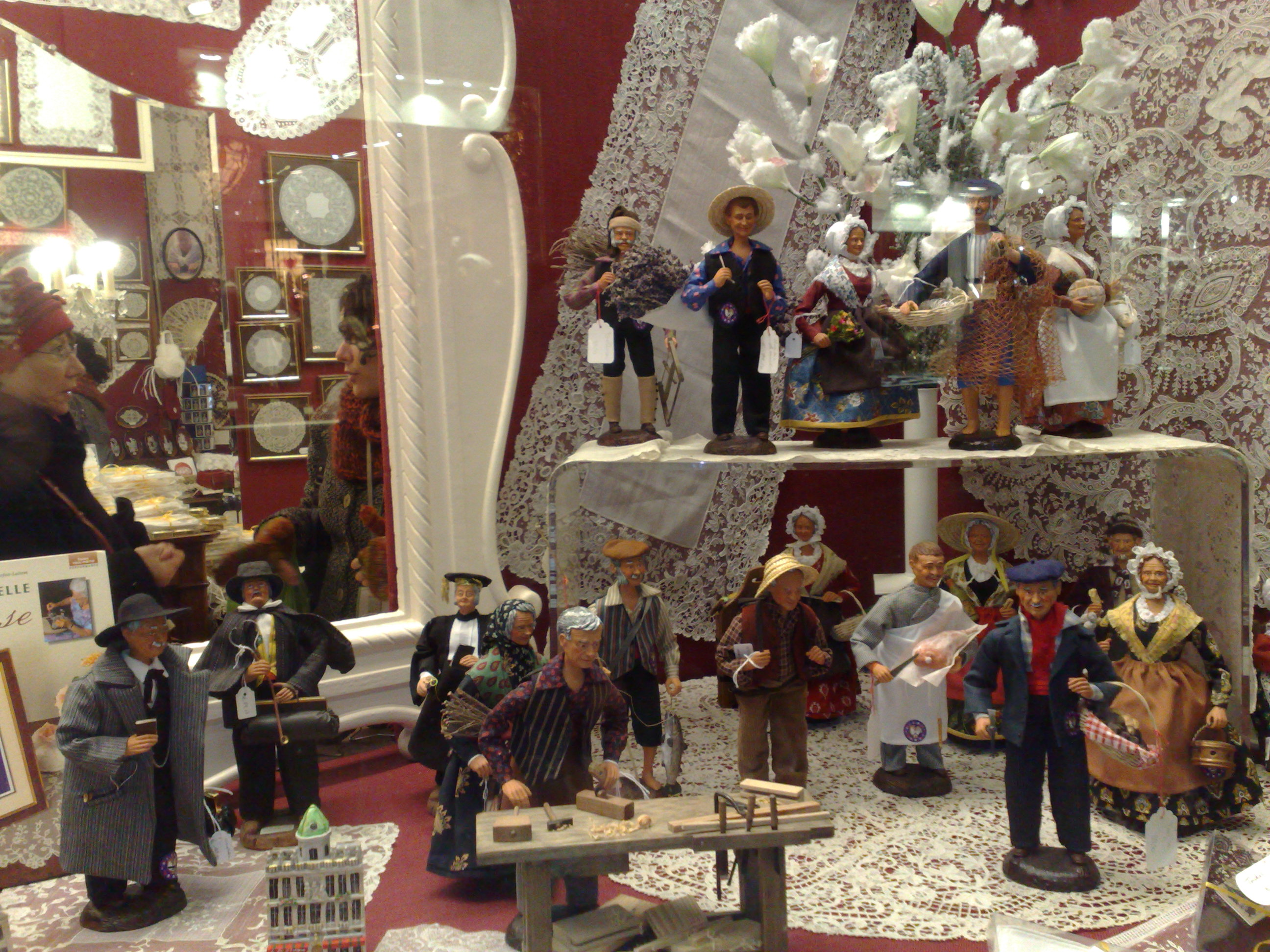 Santons de Provence à Bruxelles